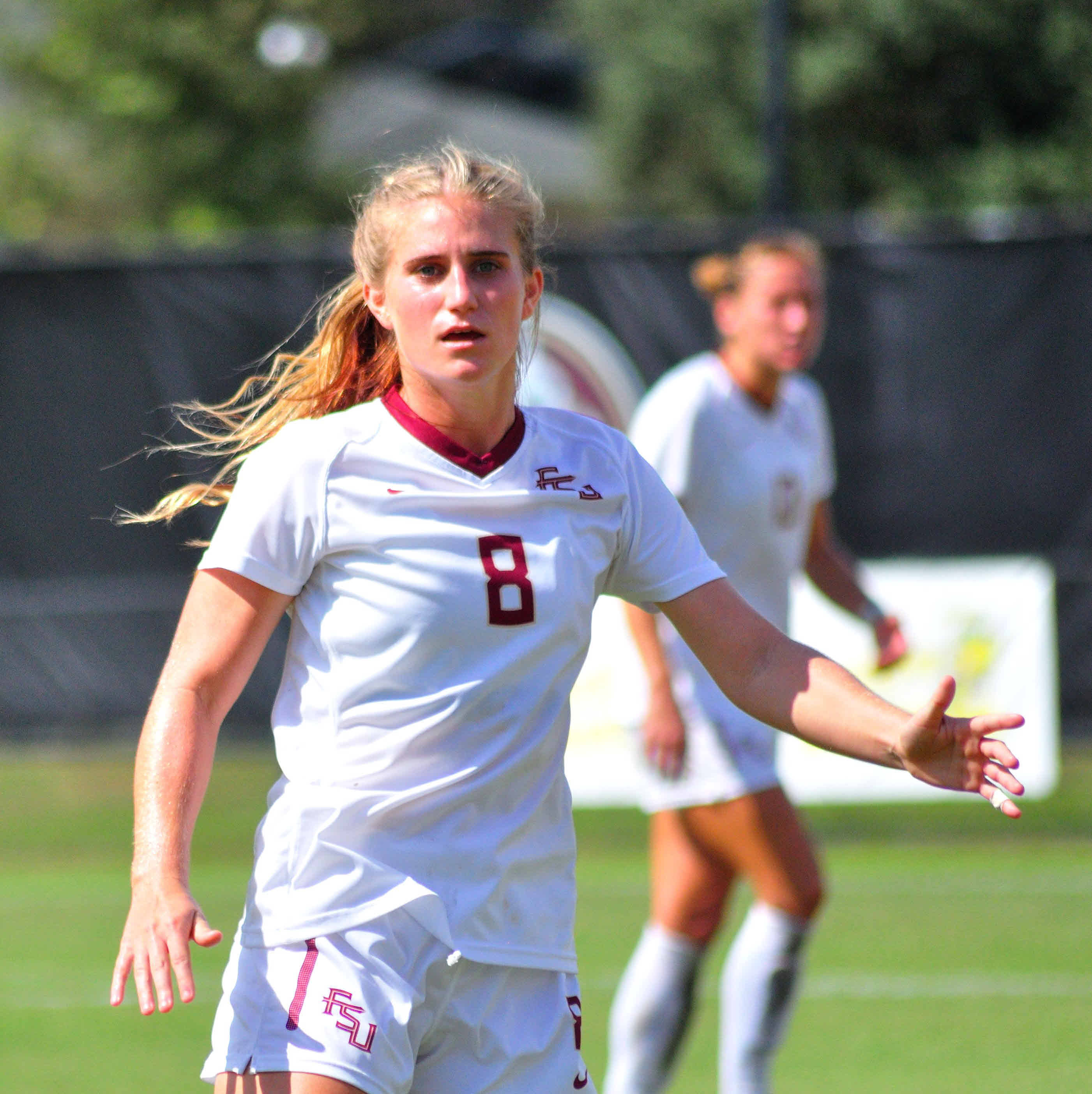 Michaela